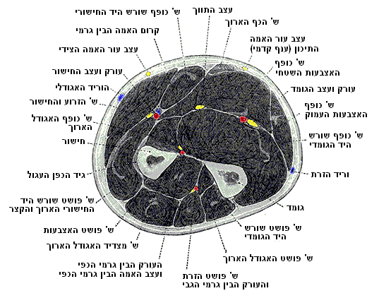 חתך רוחב במרכז האמה